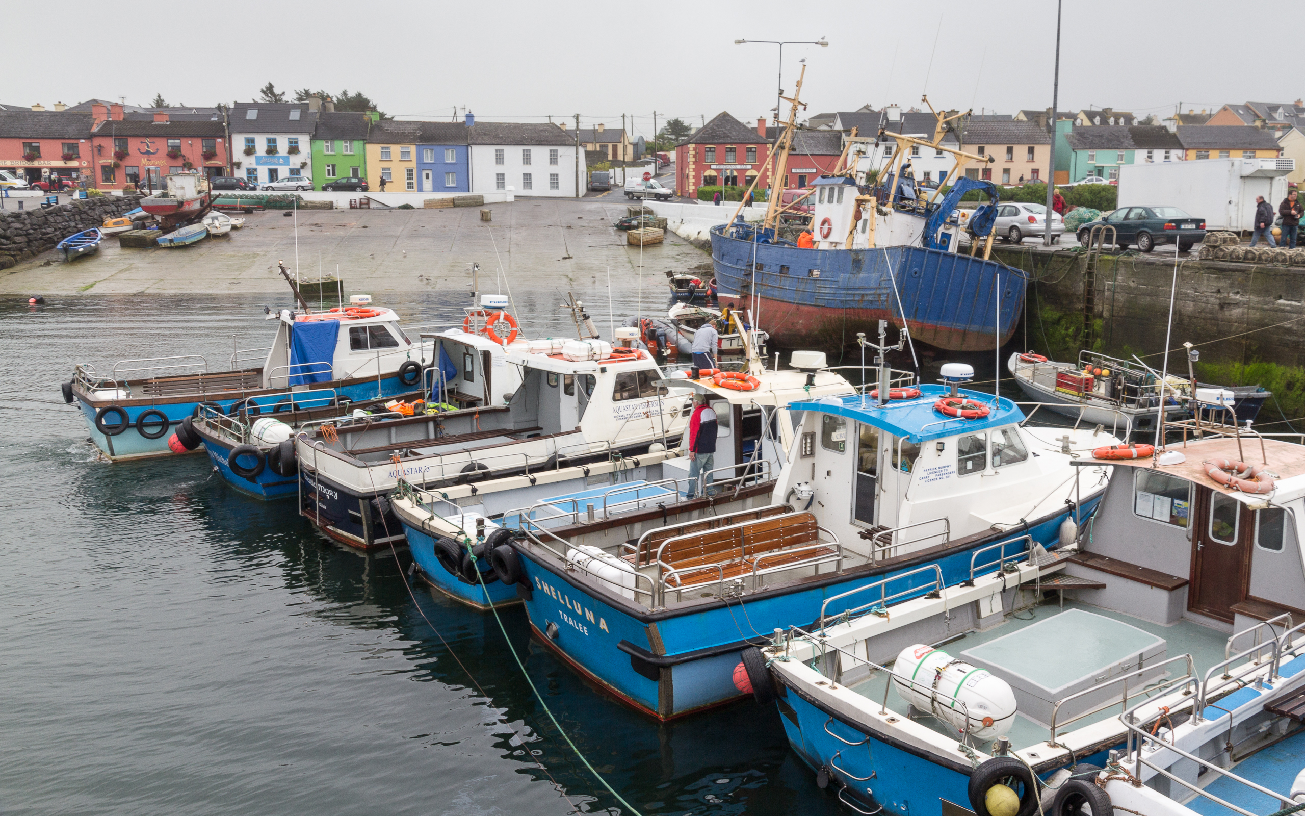 Boote zum Skellig Michael an der Pier in Portmagee, Co. Kerry